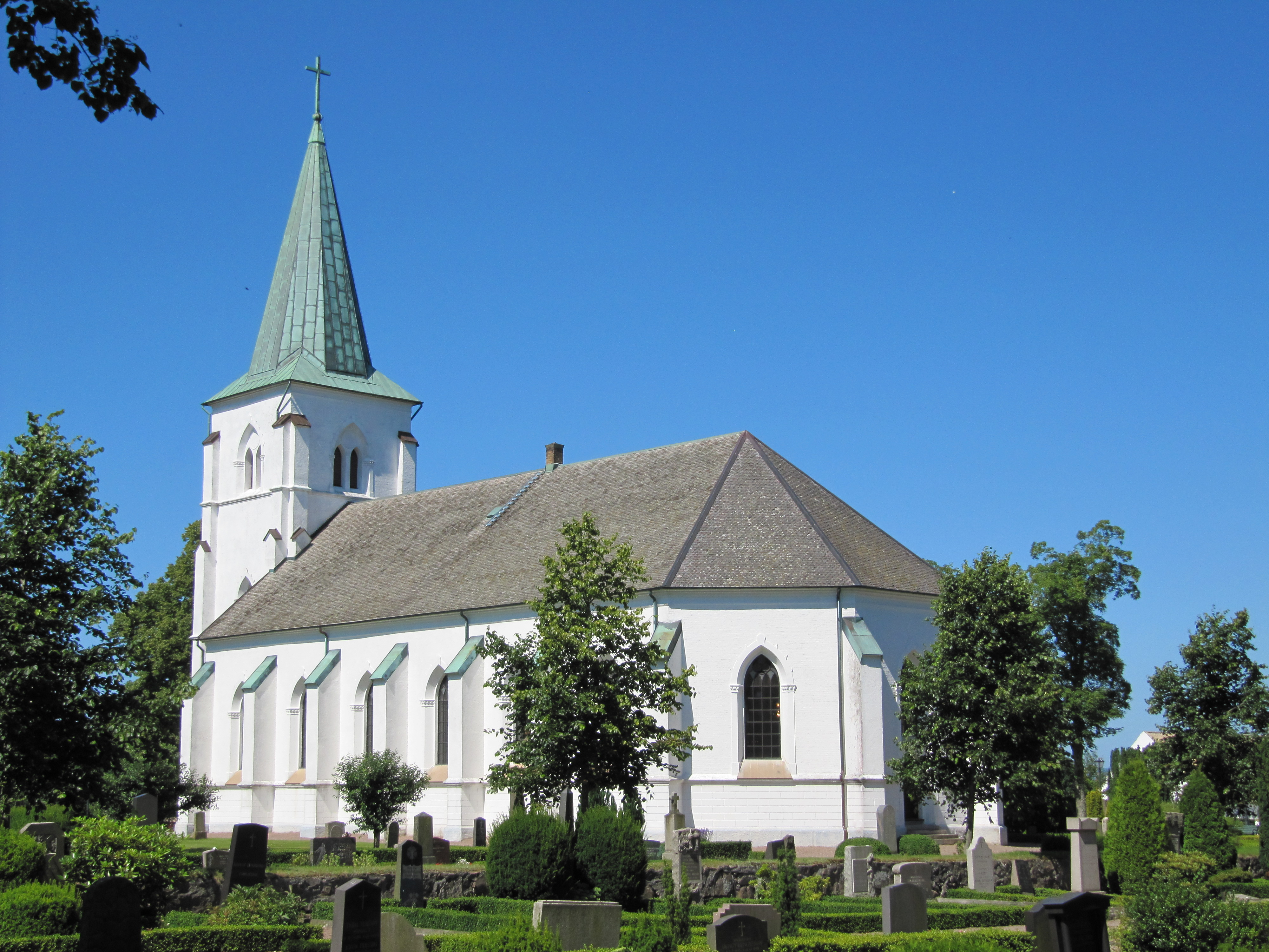 Höja kyrka